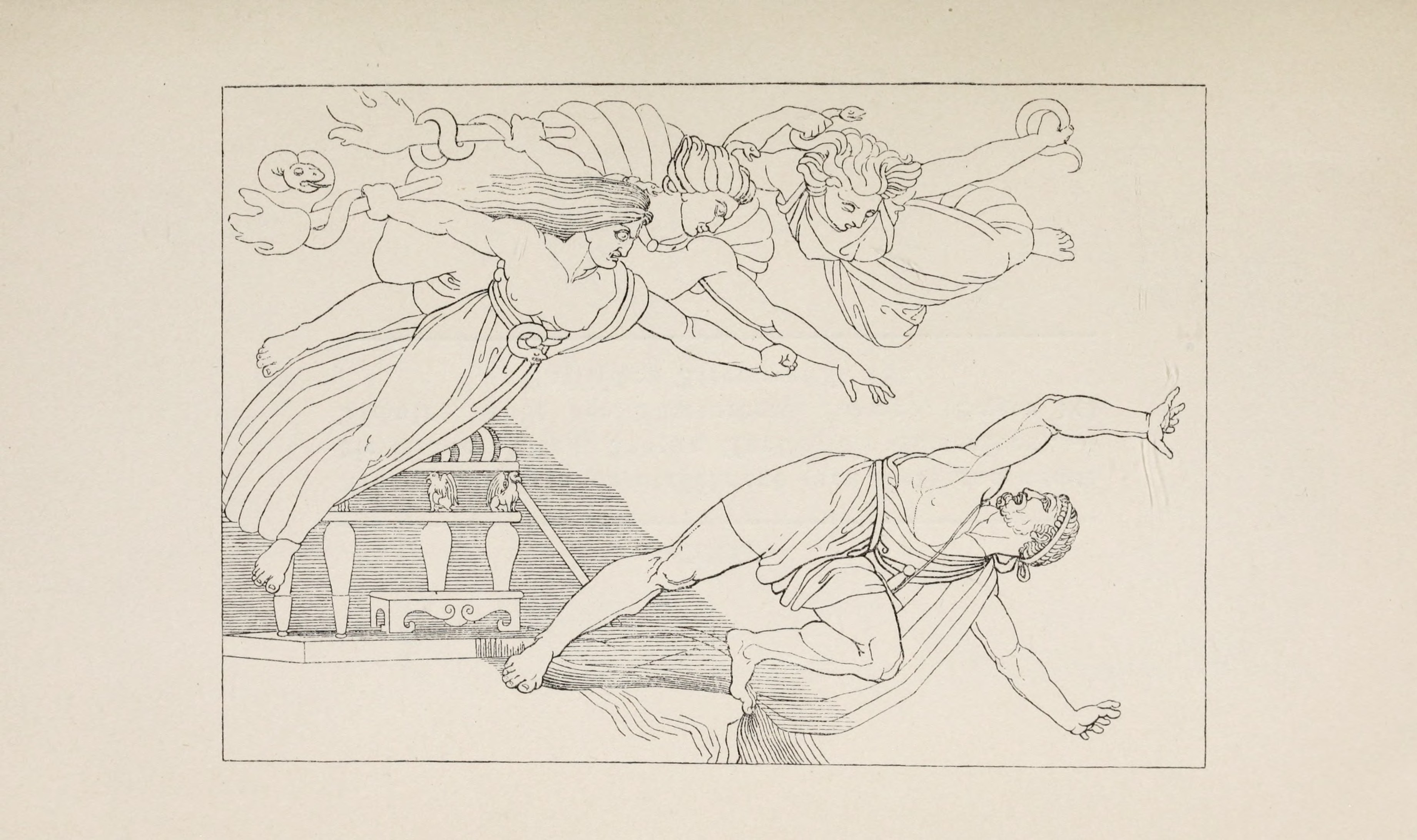 Die Erinyen den Verbrecher stürzend (aus dem Chorlied der Eumeniden). – Äschylos, Eumeniden V. 307.